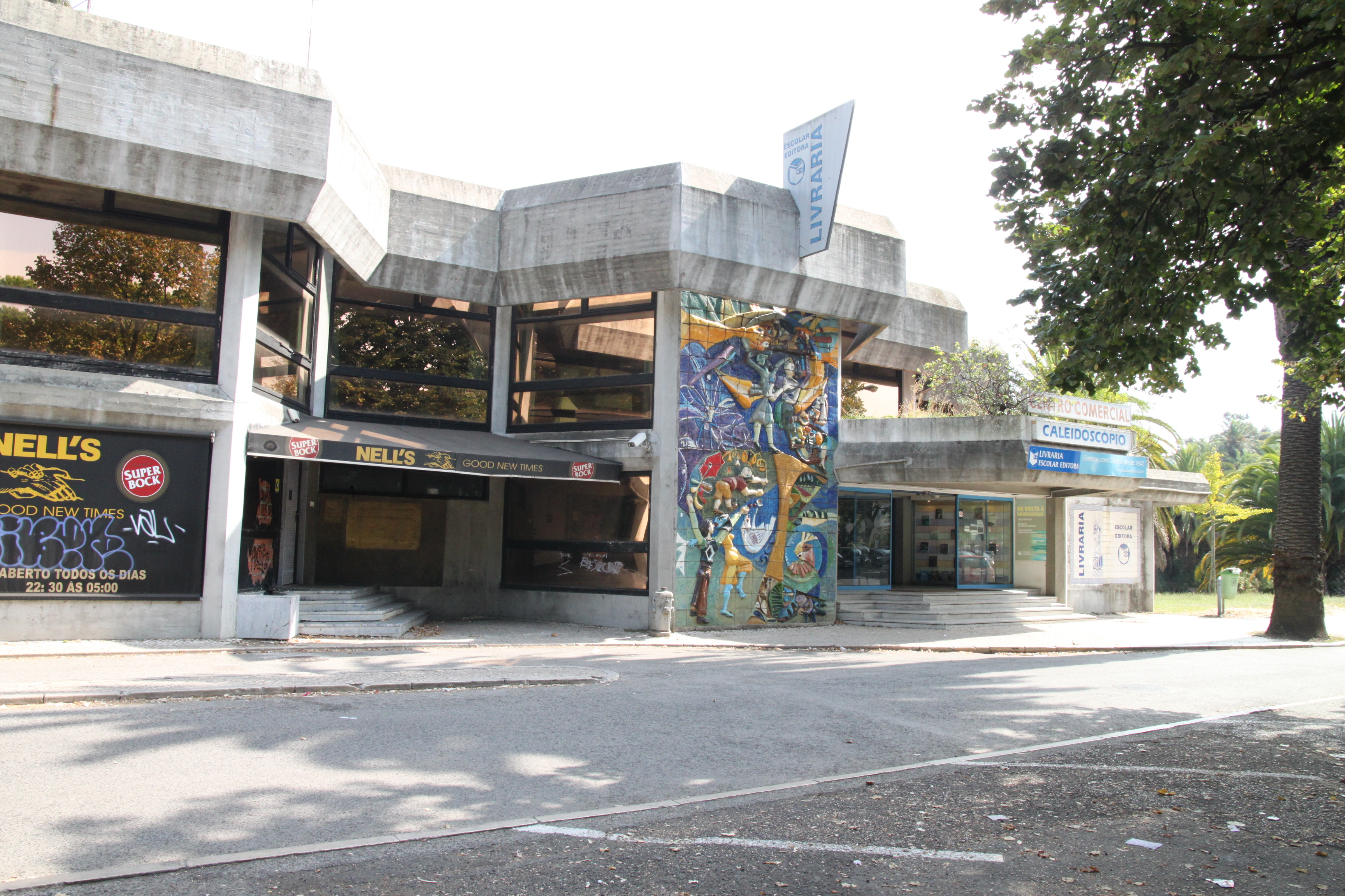 Edifício Caleidoscópio This file was uploaded for Wiki Loves Monuments in Portugal with the unique identifier 97030921.